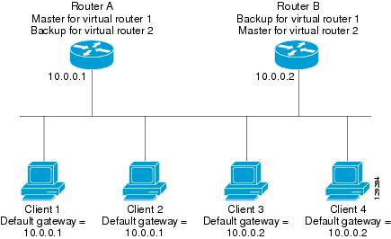 Монгол: djakjlgj